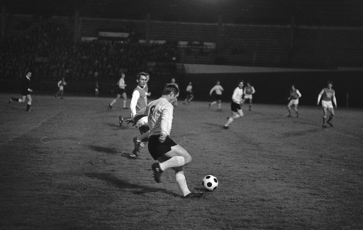 Stadium municipal de Toulouse, 1bis allées Gabriel-Biénès. 6 mai 1969. Vue d'une action de Raymond Kopa lors d'un match amical au Stadium municipal de Toulouse, 1bis allées Gabriel-Biénès.